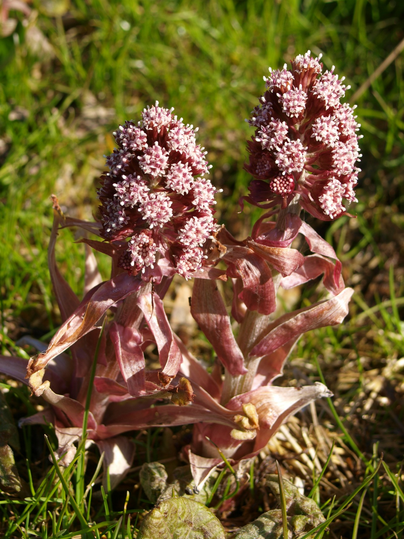 Pildil harilik katkujuur (Petasites hybridus), foto tehtud Helme alevikus Helme vallas Valga maakonnas.